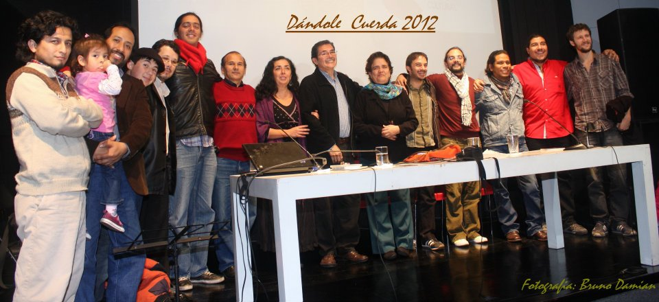 Dándole Cuerda Perú 2012